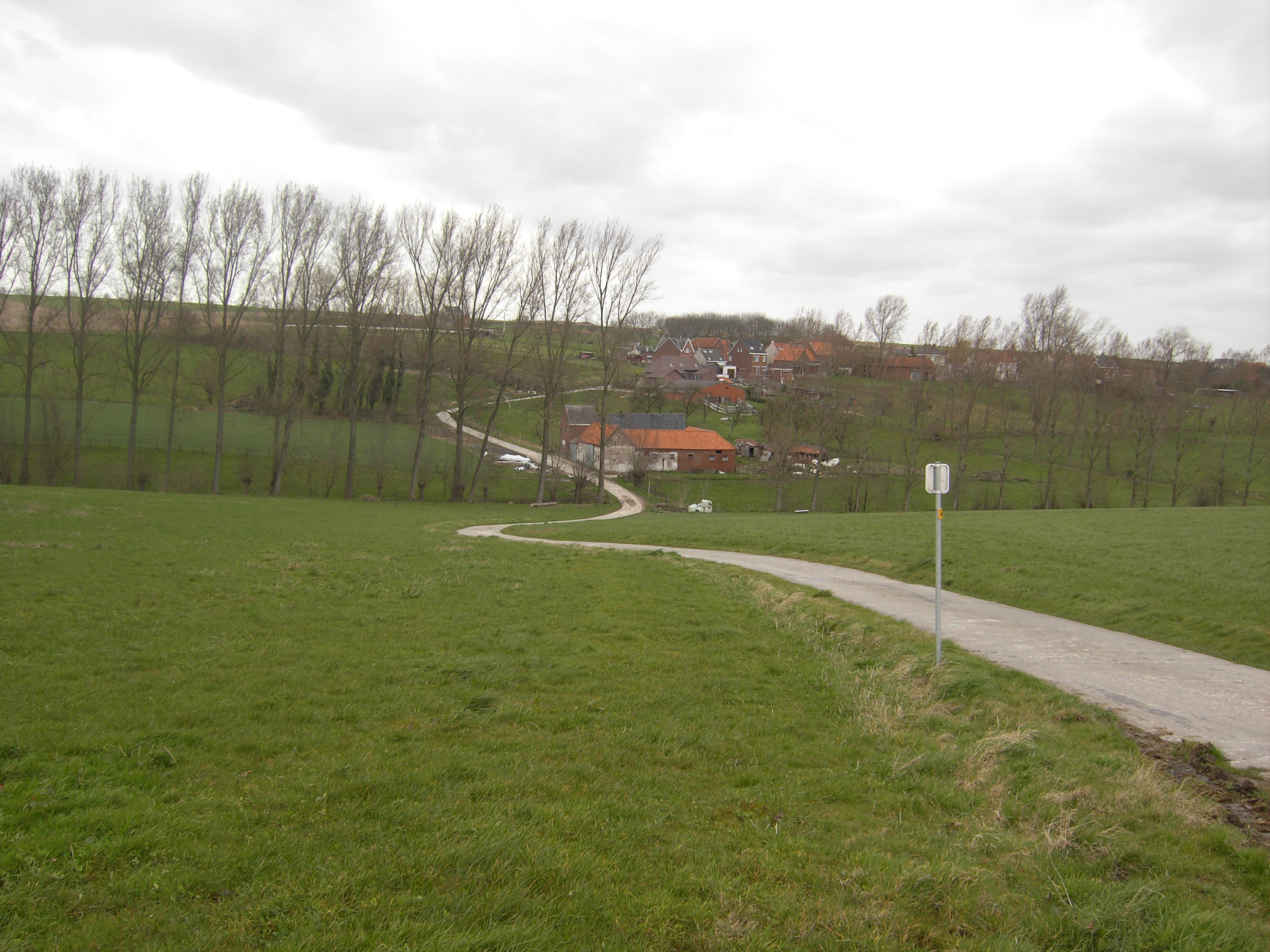 Brakel (Belgium) - De Rekelberg